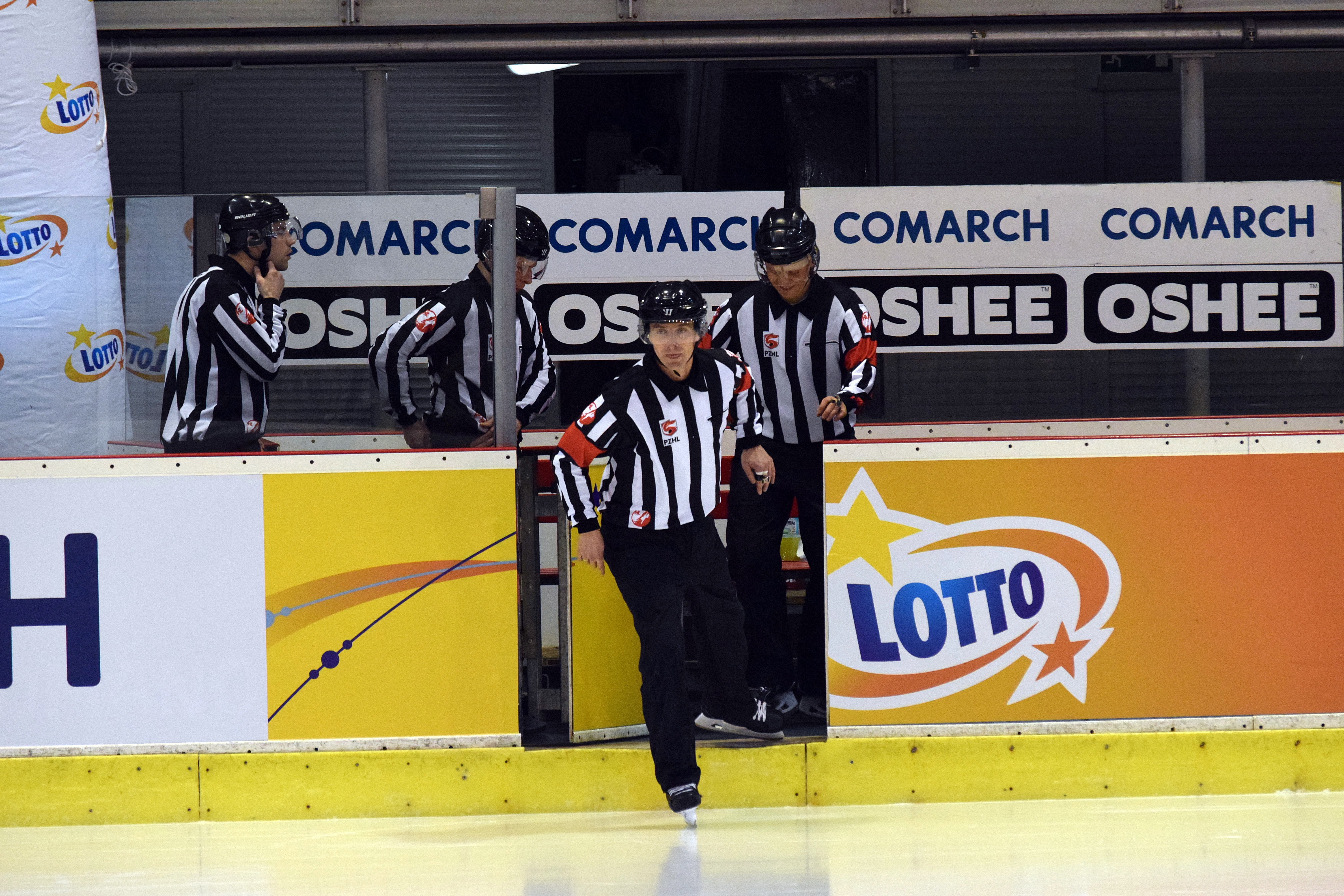 Sędziowie meczu finałowego Pucharu Polski Przemysław Kępa, Paweł Meszyński (główny), Wojciech Moszczyński, Sławomir Szachniewicz (liniowi).